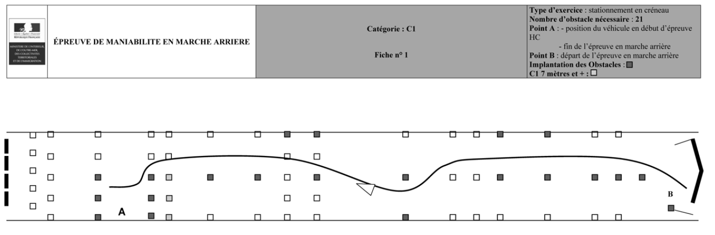 Permis de conduire C1 en France - schéma d'un exemple d'épreuve pratique.